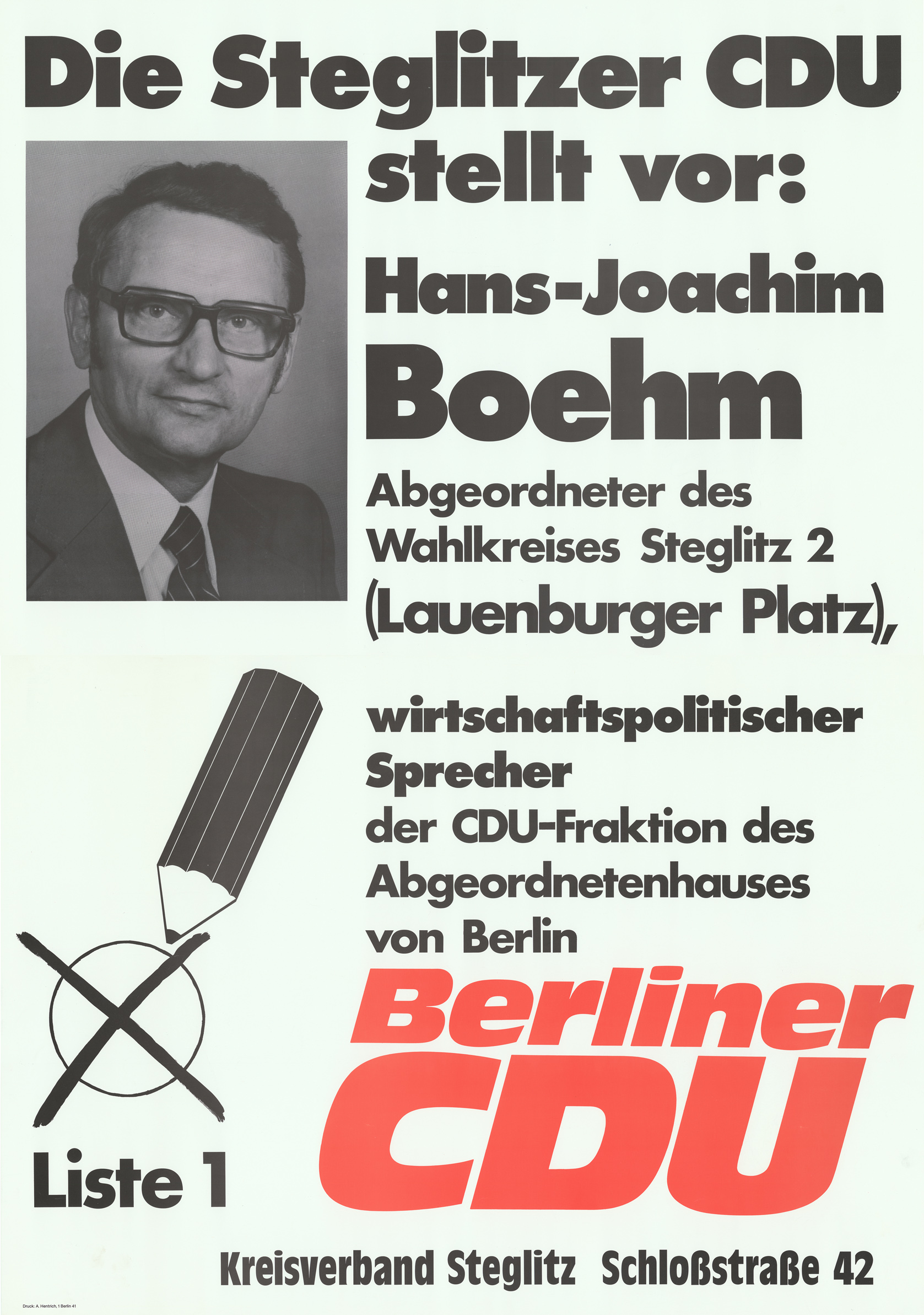 Die Steglitzer CDU stellt vor: Hans-Joachim Boehm ... wirtschaftspolitischer Sprecher der CDU-Fraktion des Abgeordnetenhauses von Berlin Liste 1 Berliner CDU Kreisverband Steglitz ... Abbildung: Porträtfoto - Bleistift mit Stimmkreuz Kommentar: Zweiteiliges Plakat Plakatart: Kandidaten-/Personenplakat mit Porträt Auftraggeber: KV Steglitz Drucker_Druckart_Druckort: A. Hentrich, Berlin-Steglitz Objekt-Signatur: 10-004 : 538 Bestand: Plakate zu Abgeordnetenhauswahlen Berlin (10-004) GliederungBestand10-18: Plakate zu Abgeordnetenhauswahlen Berlin (10-004) » CDU Lizenz: KAS/ACDP 10-004 : 538 CC-BY-SA 3.0 DE